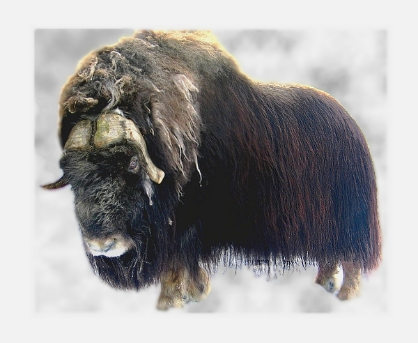 Ovibos moschatus (wół piżmowy)